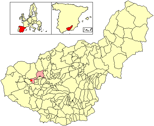 Situación de la localidad de Fuensanta (en el municipio de Pinos Puente) respecto a la provincia de Granada, en España.